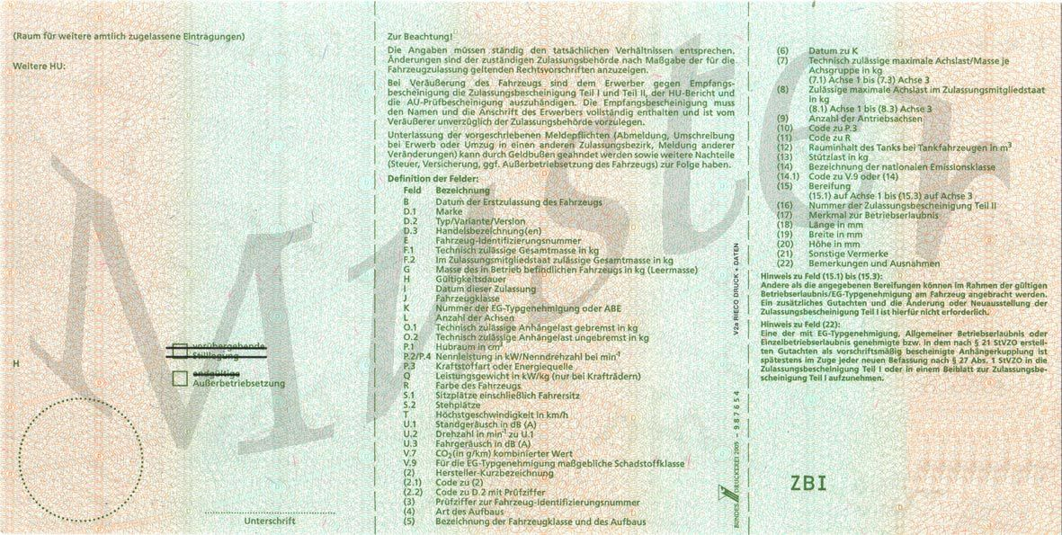 New German/European car registration document form (Zulassungsbescheinigung Teil I, Rückseite)